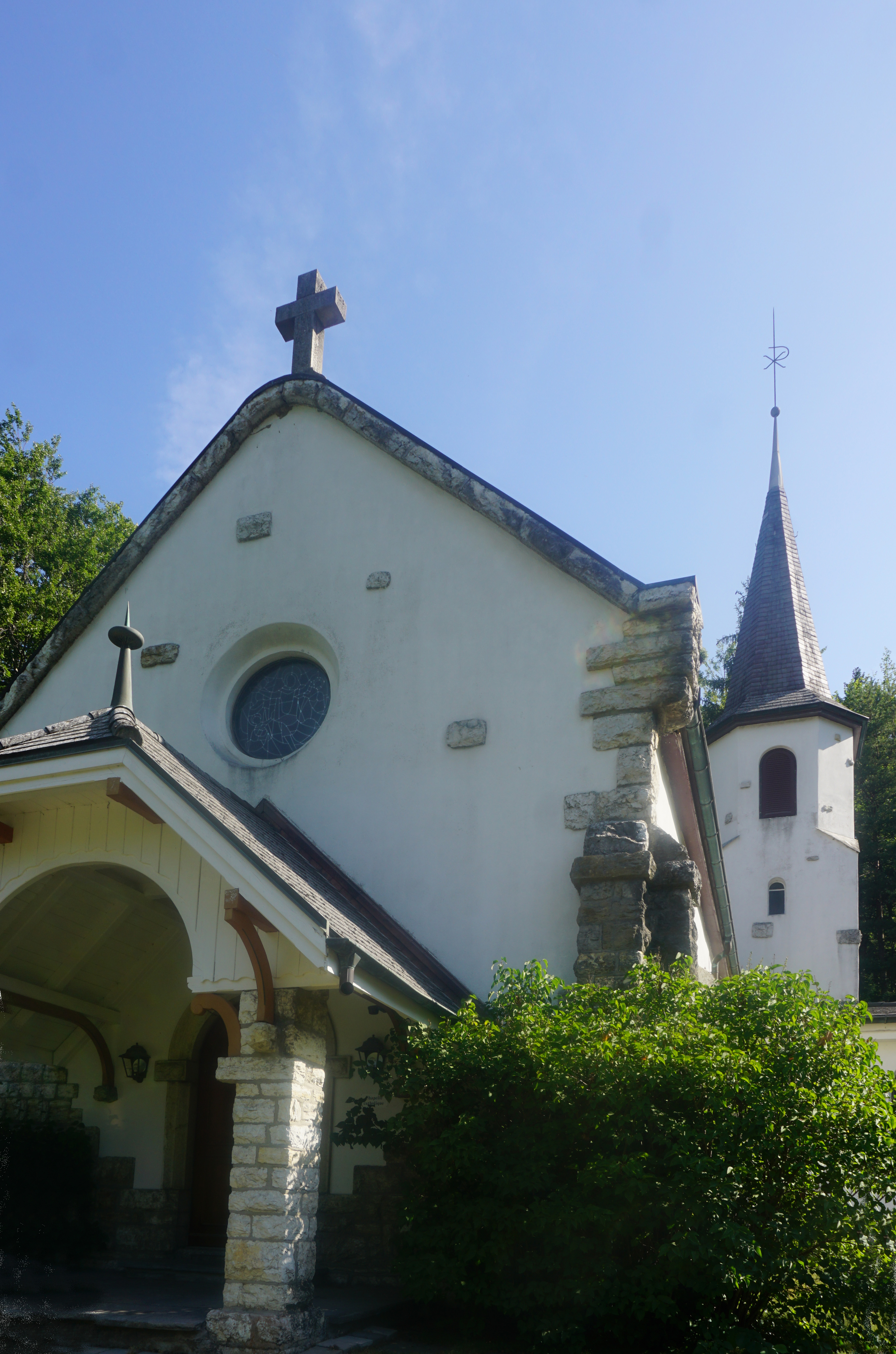 Katholische Kapelle St. Marie von 1904 in Péry